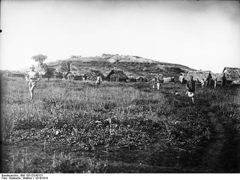 Am 15. August 1914 nahmen wir Taveta in Britisch-Ostafrika